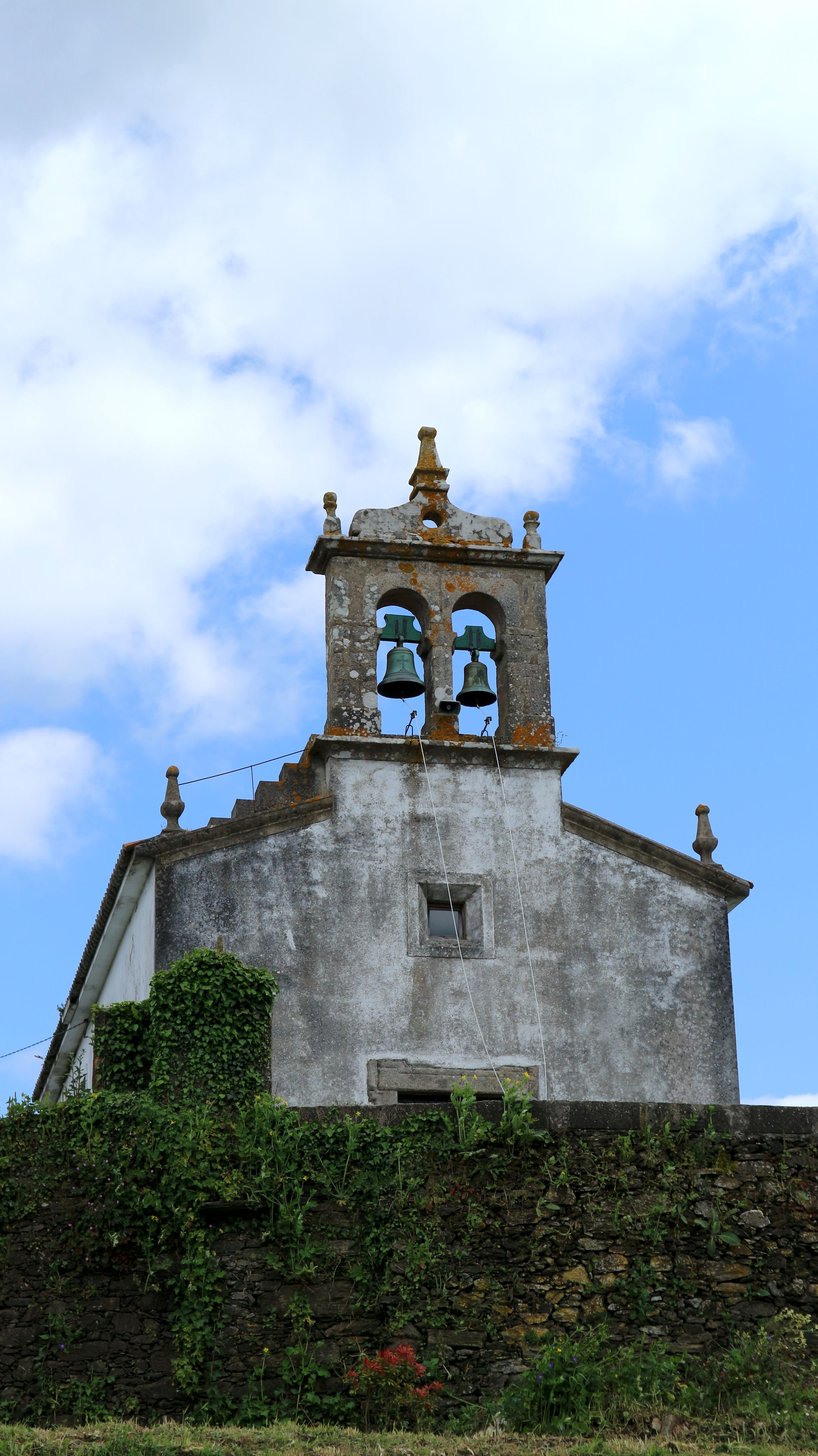 Igrexa de Santaia de Probaos. Probaos, Oza-Cesuras.